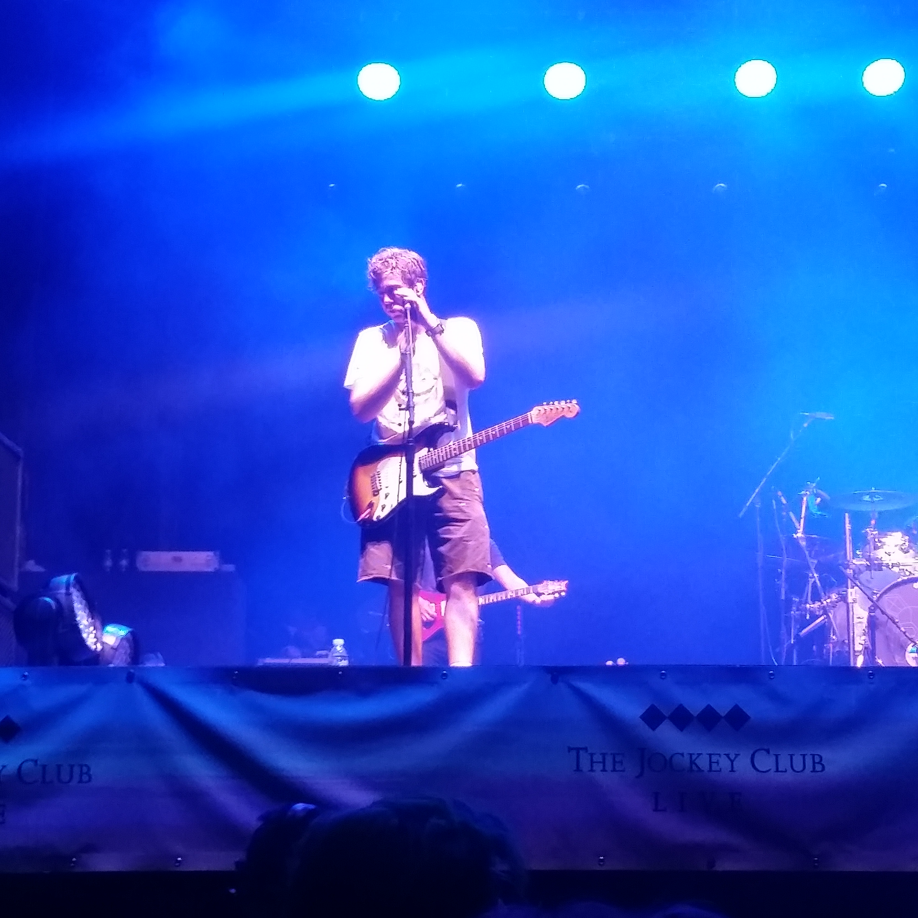 Bourne esiintymässä Newmarketin kilparadalla "Newmarket Nights"-tapahtumassa Bustedin kanssa, Heinäkuussa 2016.